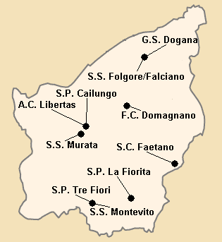 Répartition des clubs en Serie A1 1987-1988.